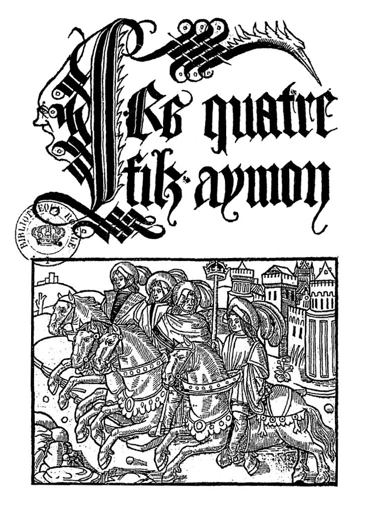 Les quatre fils Aymon par Jean de Vingle (Lyon), 1497, sur la base d'un texte en moyen français attribué à Huon de Villeneuve.